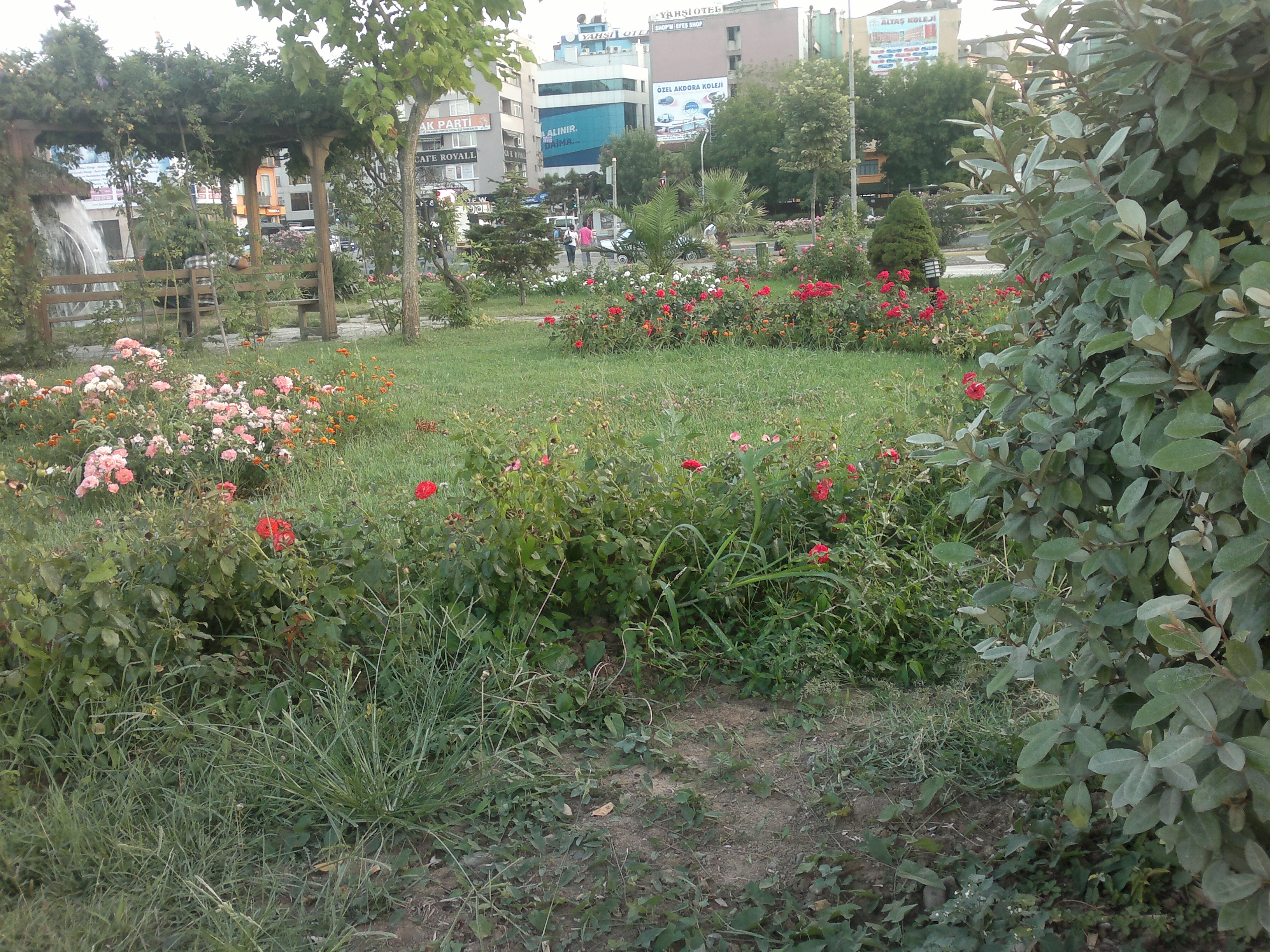 Fatsa -Botanik Park Gül Bahçesi